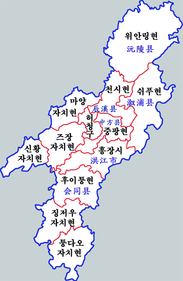 화이화시 현급행정구역도